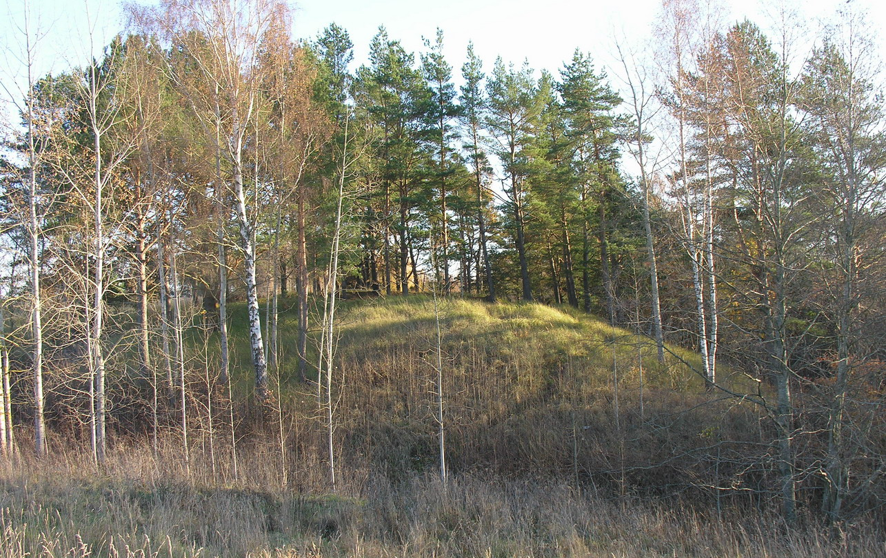 Naikių piliakalnis (IX-X a.), Mažeikių raj. Foto: Algirdas, 2005 m. lapkričio 1 d.